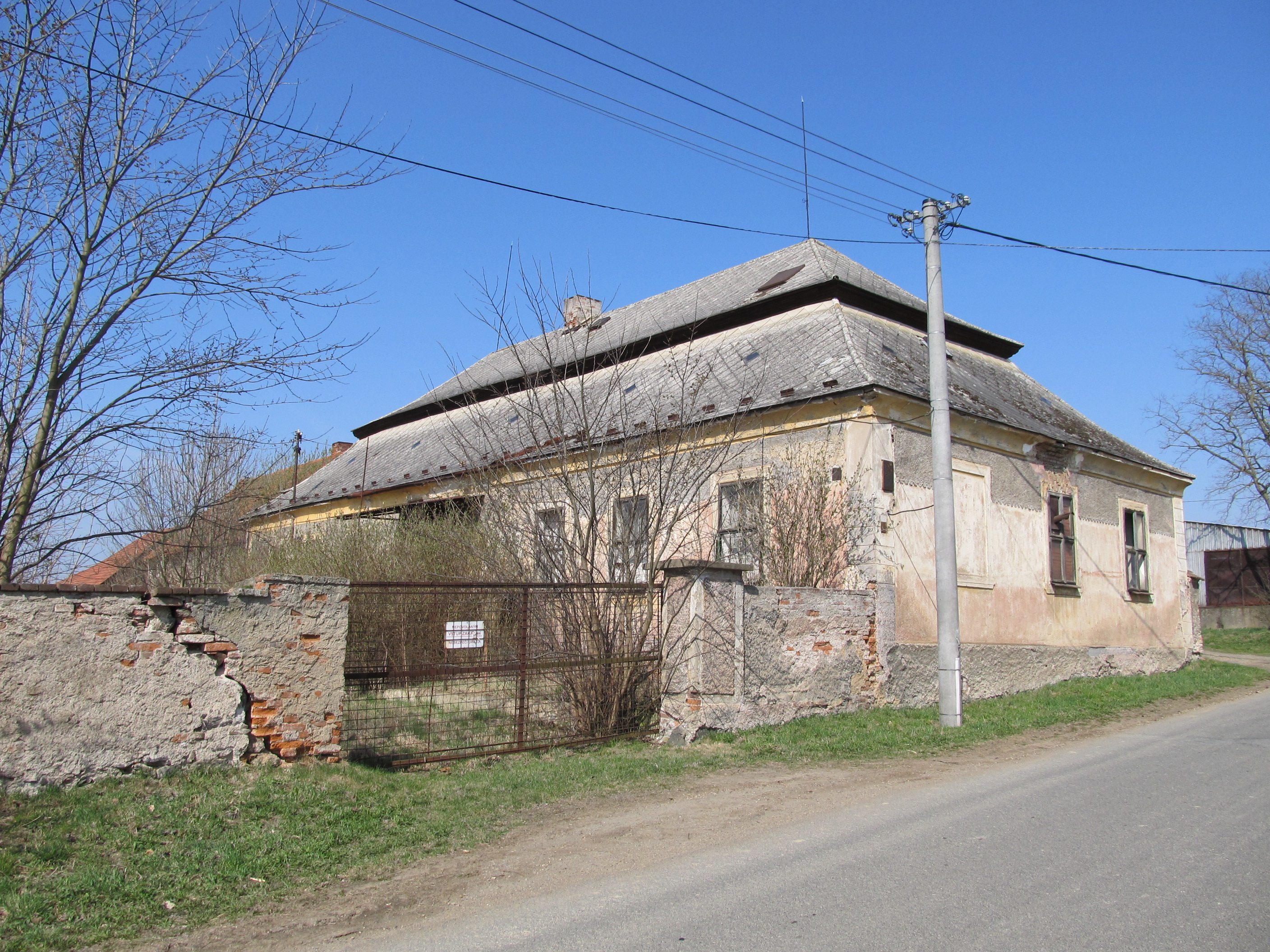 Prašný Újezd - chudák zámek